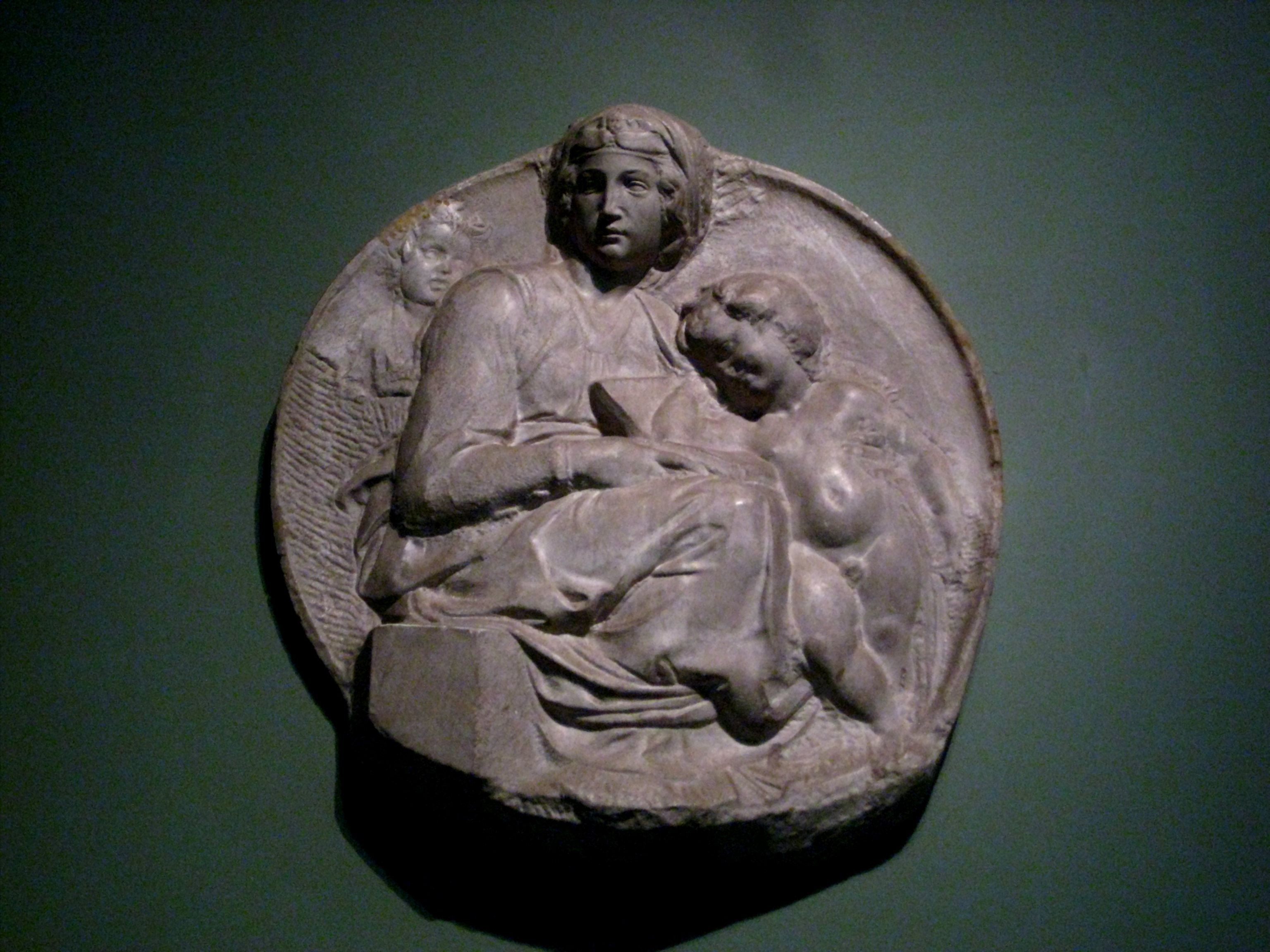 Pitti Tondo